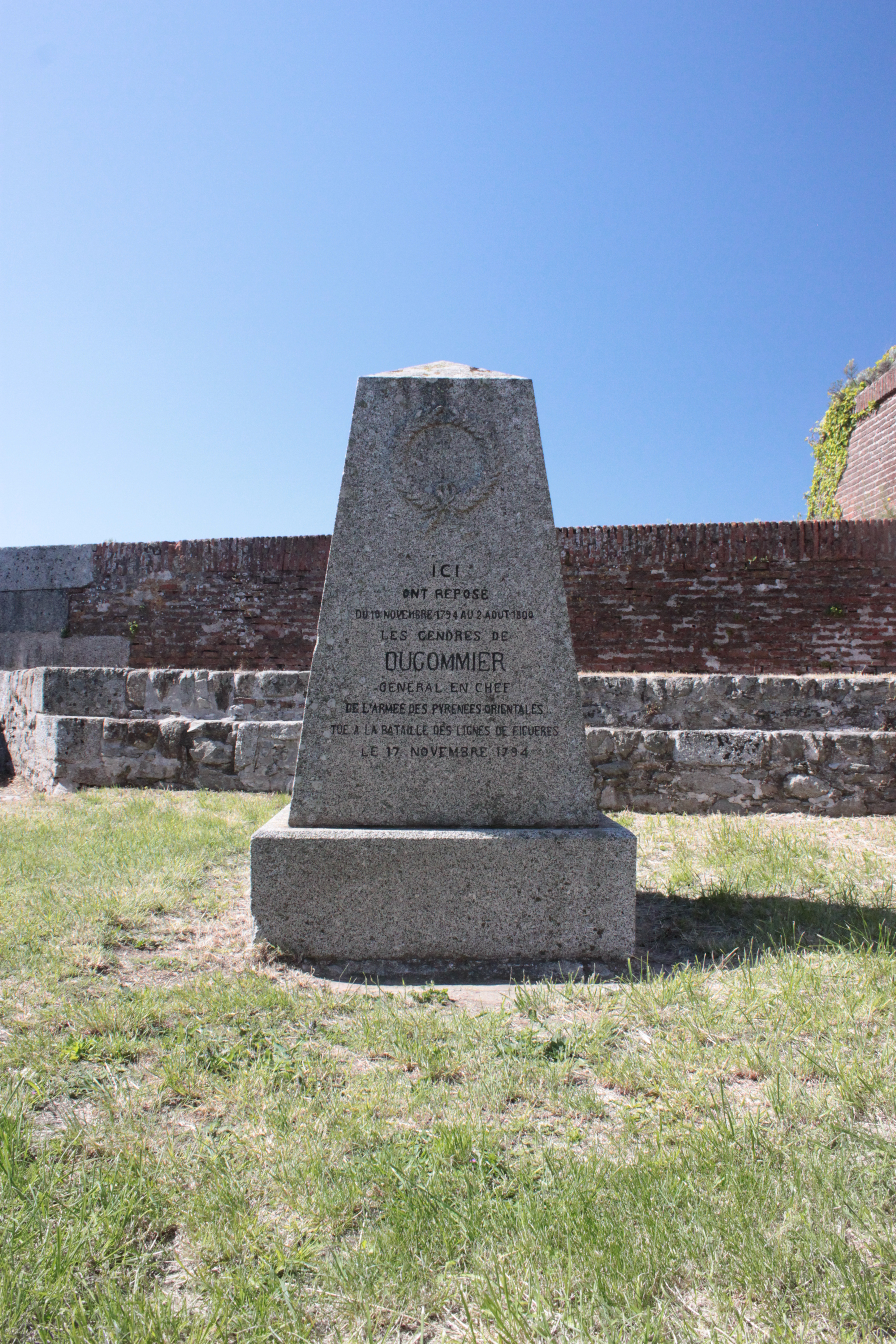 Stèle du Général Dugommier, fort de Bellegarde, Fr-66-Perthus.